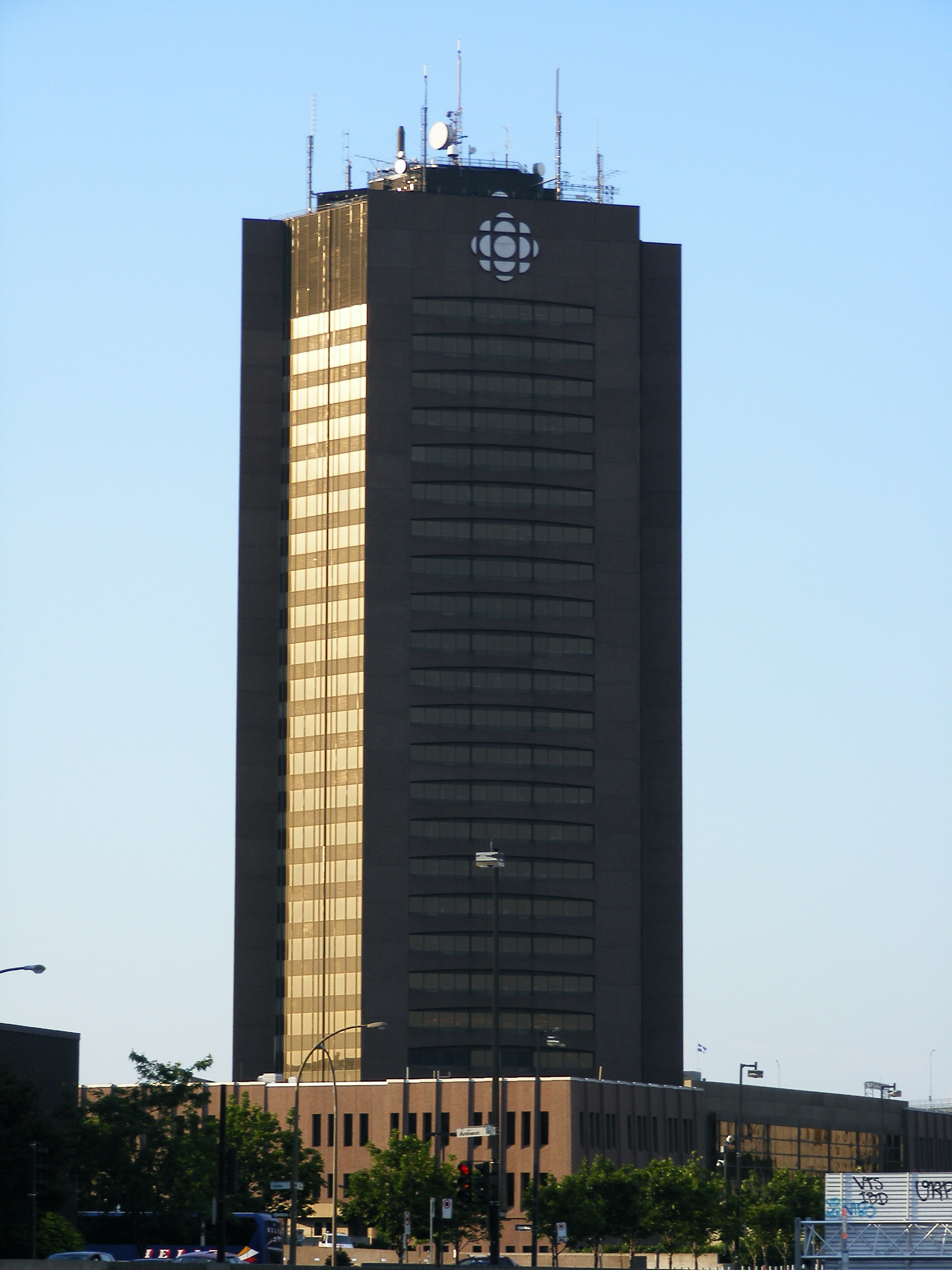 Montréal